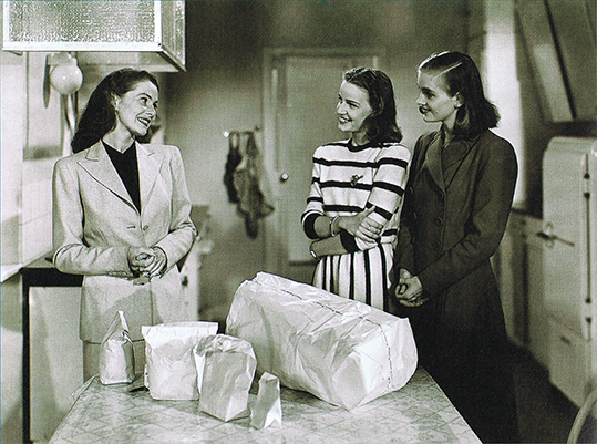 Stillbild på Sonja Wigert, Ulla Andréasson och Eva Henning i samband med filmen "En fluga gör ingen sommar" (1947).